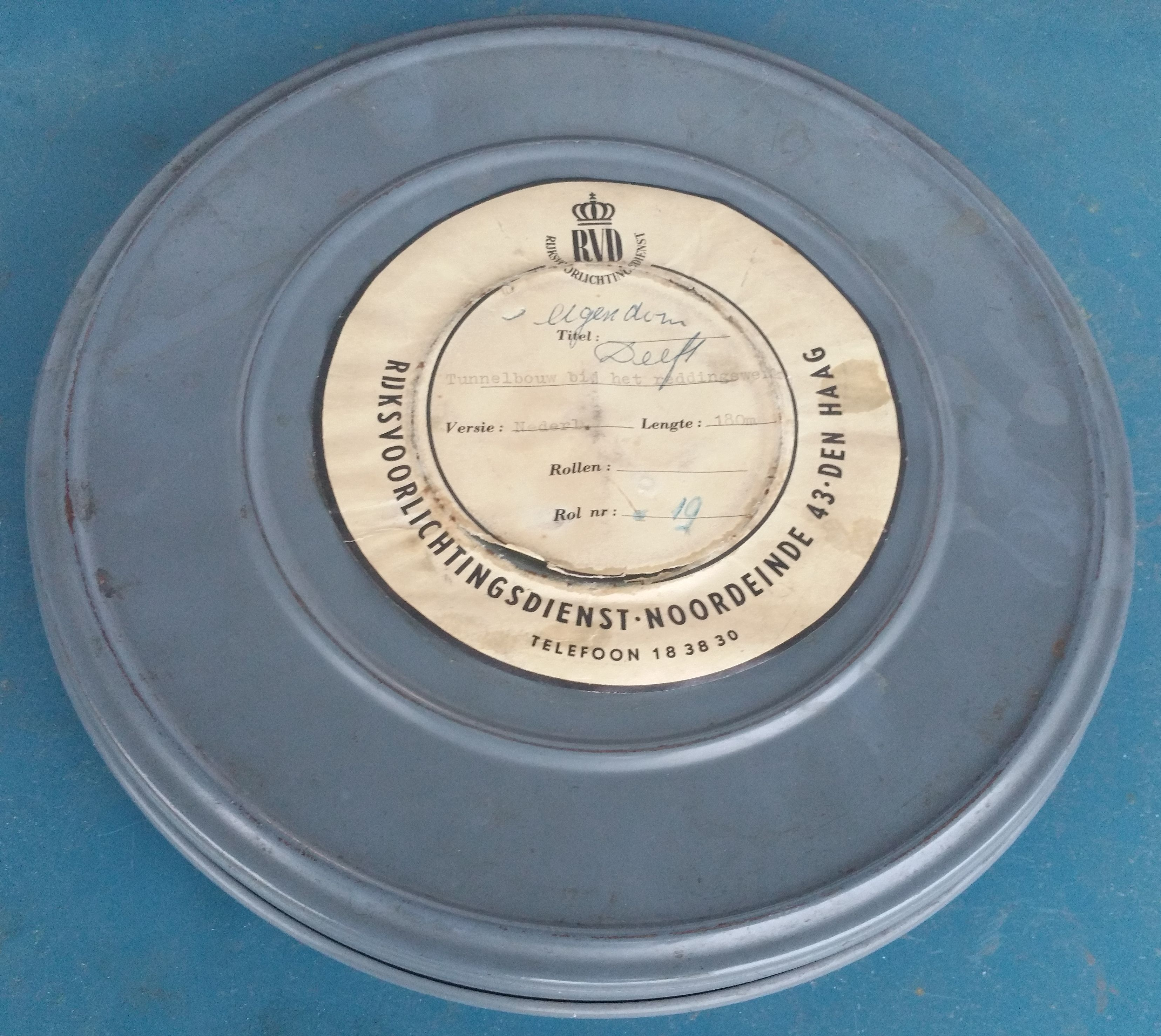 Filmblik van de Rijksvoorlichtsdienst (ca. jaren 60)